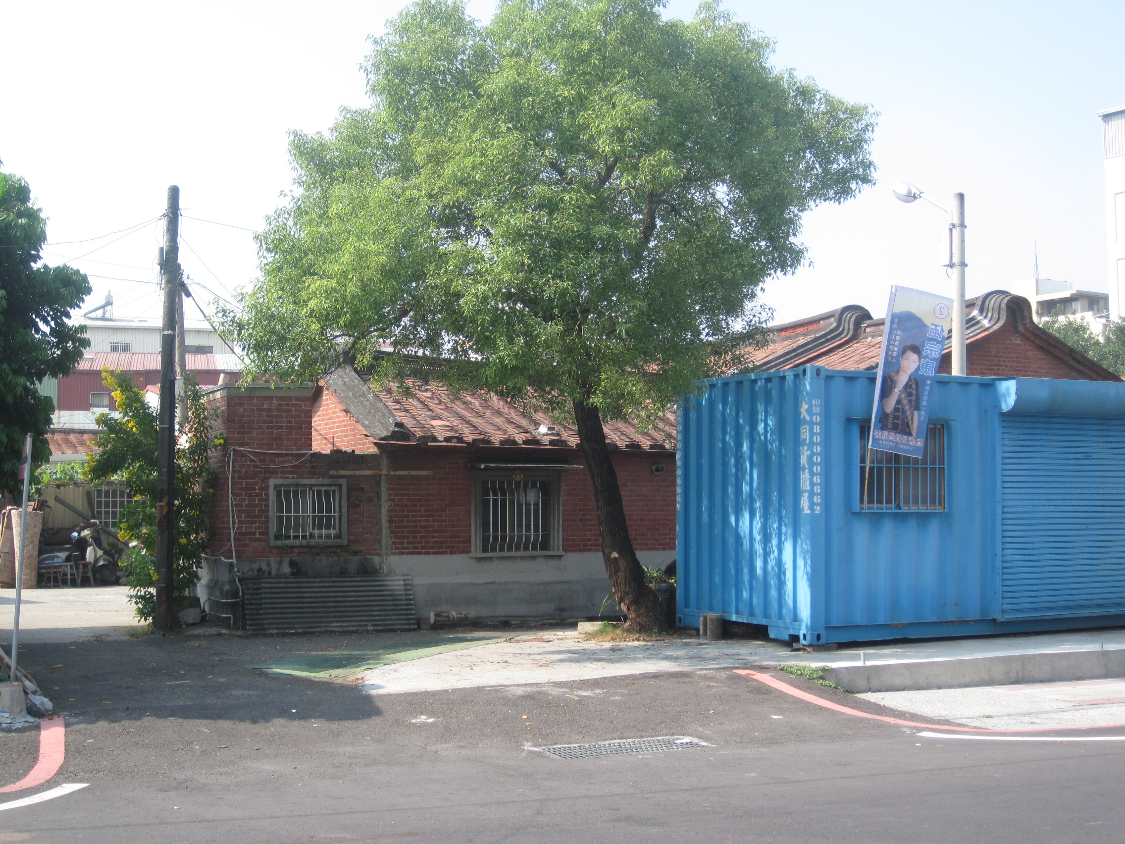 臺南德高厝老屋